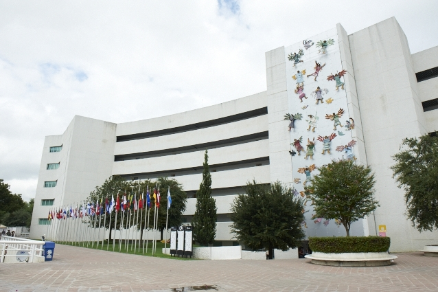 Ciap campus monterrey